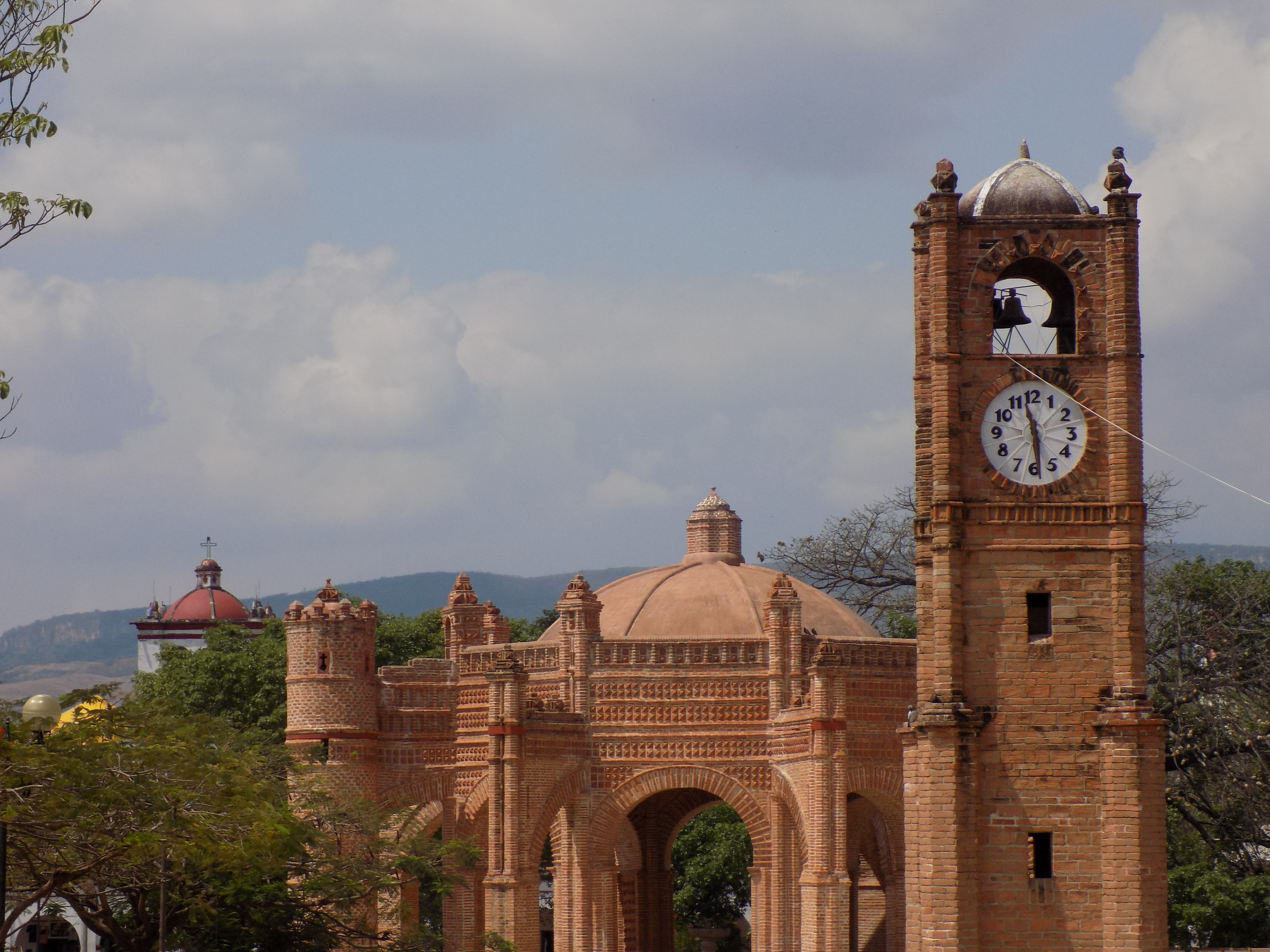 VISTA DE LA PILA Y EL VIEJO RELOJ EN CHIAPA DE CORZO